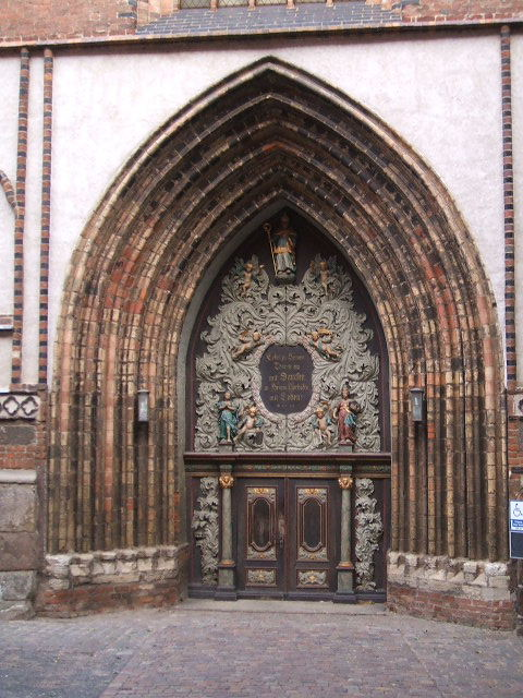 Stralsund,_Germany,_Nikolaikirche,_Eingang_(2006-09-26)